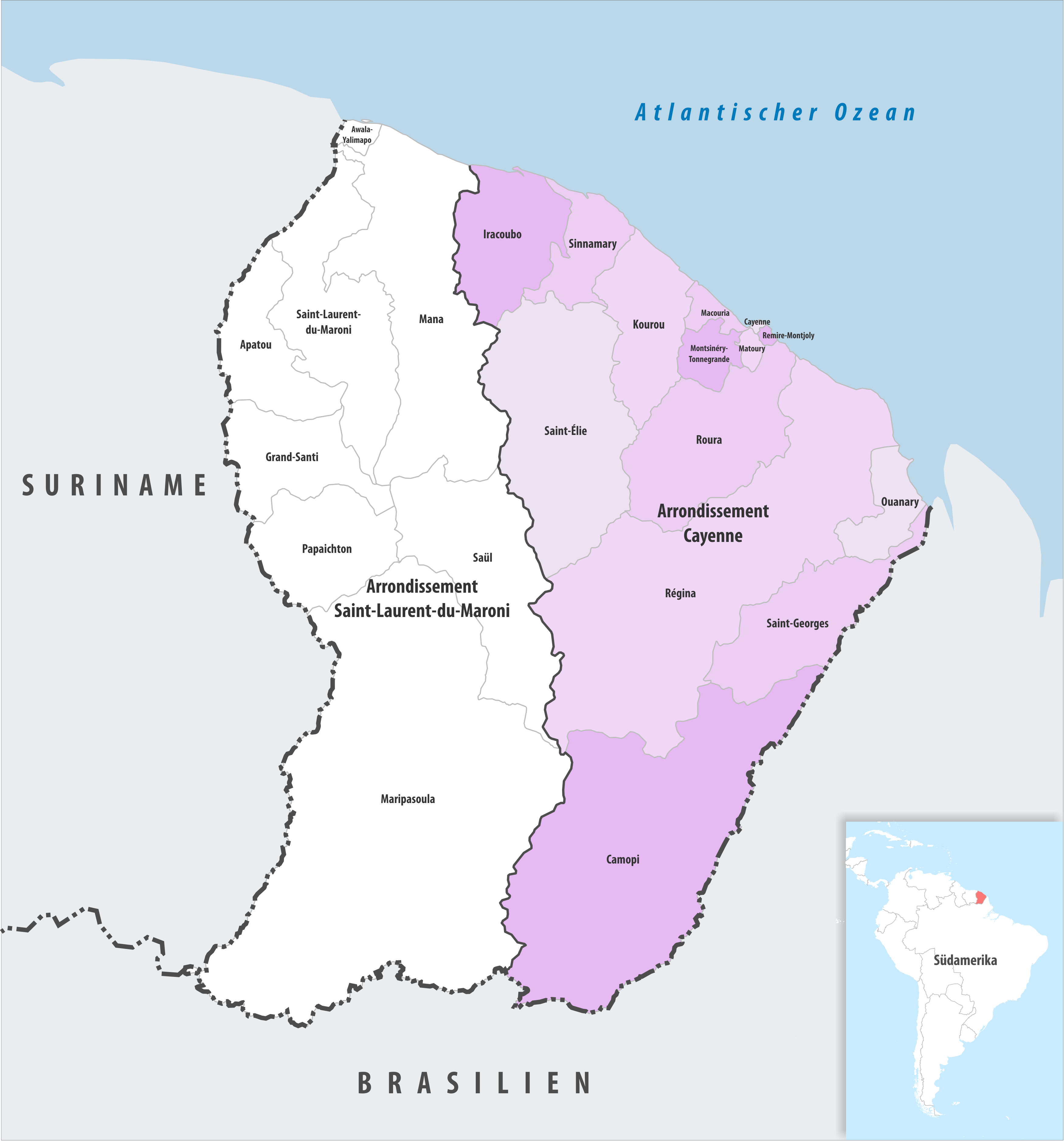 Lage des Arrondissements Cayenne